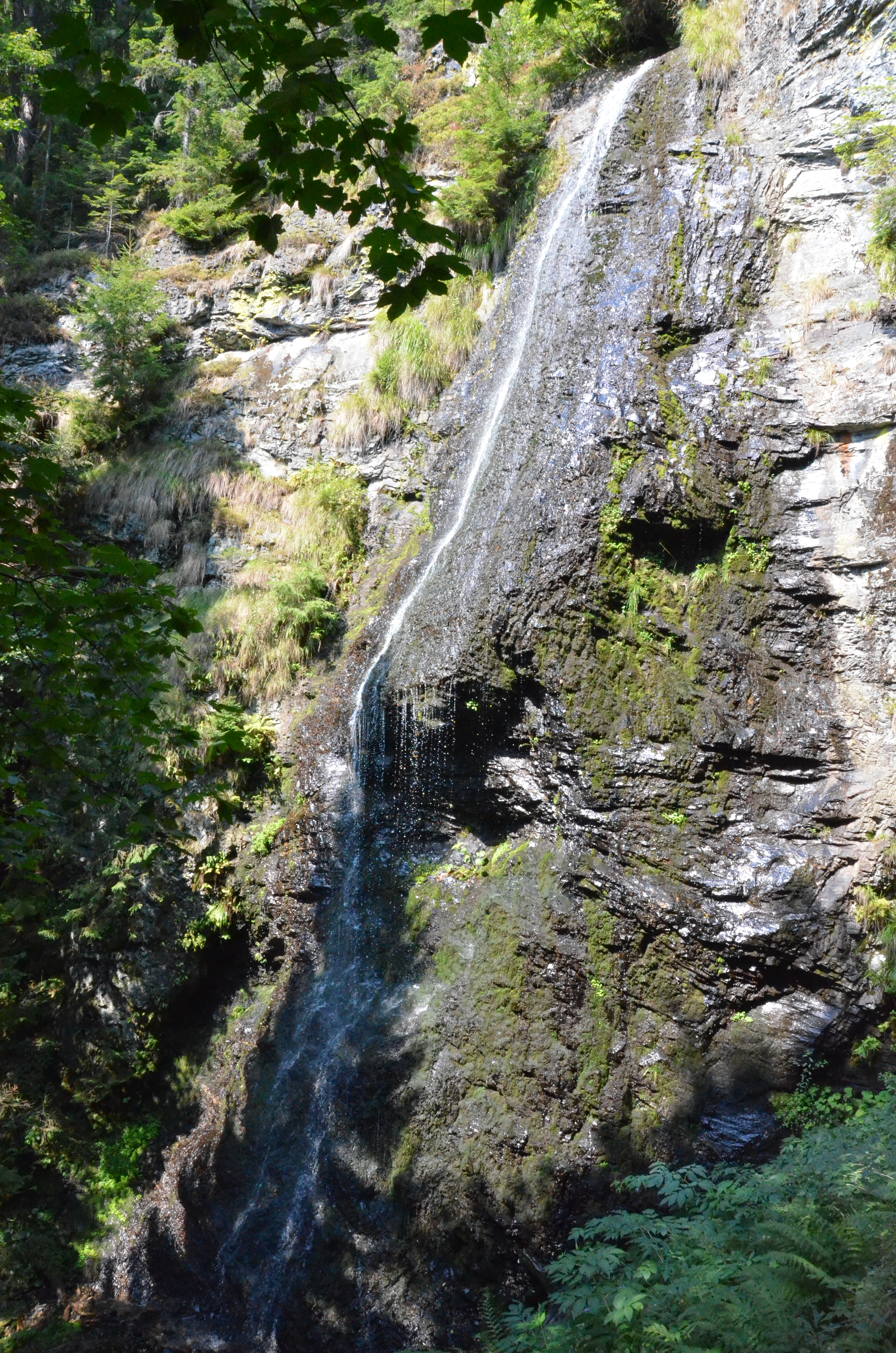 Карпатський біосферний заповідник, Рахівський, Тячівський, Хустський, Виноградівський райони